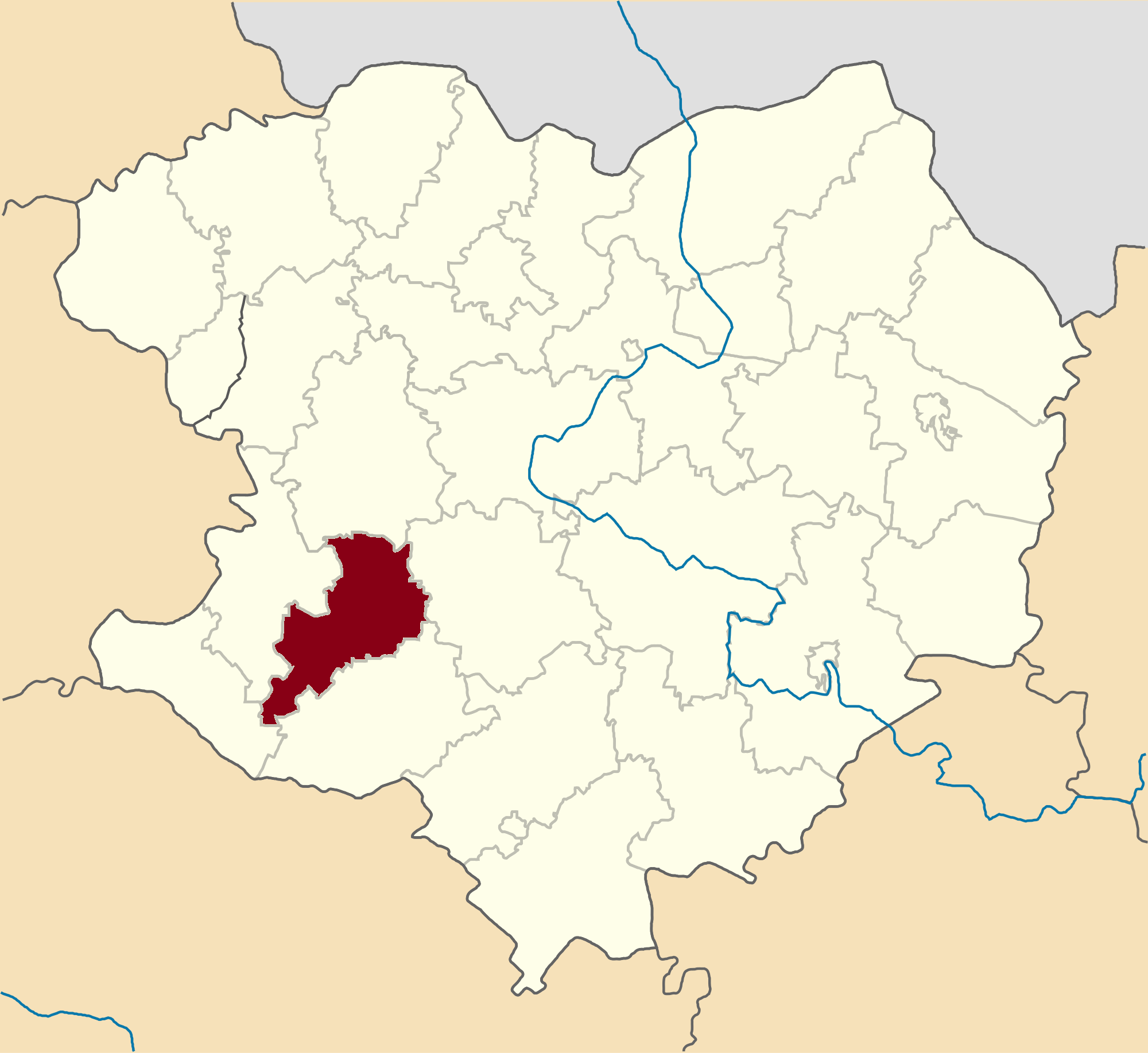 Kehychivskyi-Raion map